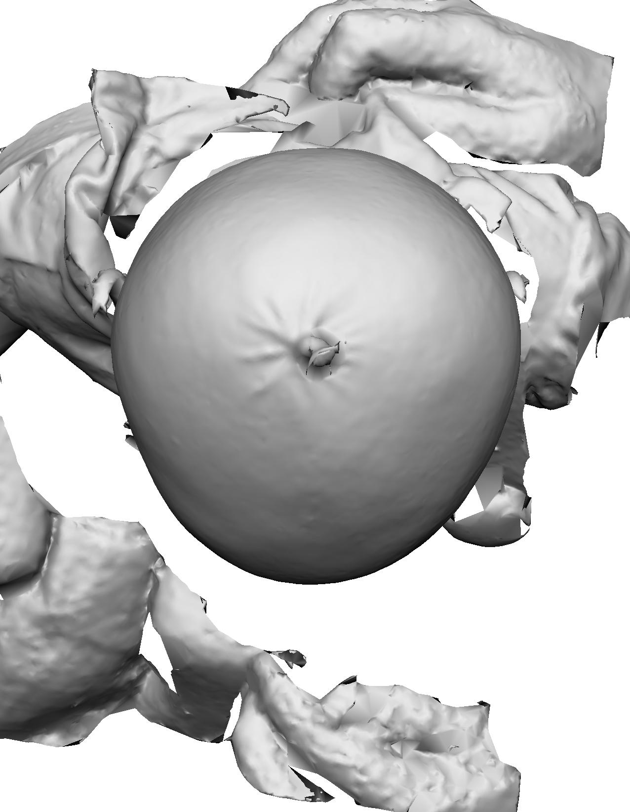 Schädelform nach ca. 7 Monaten Helmtherapie